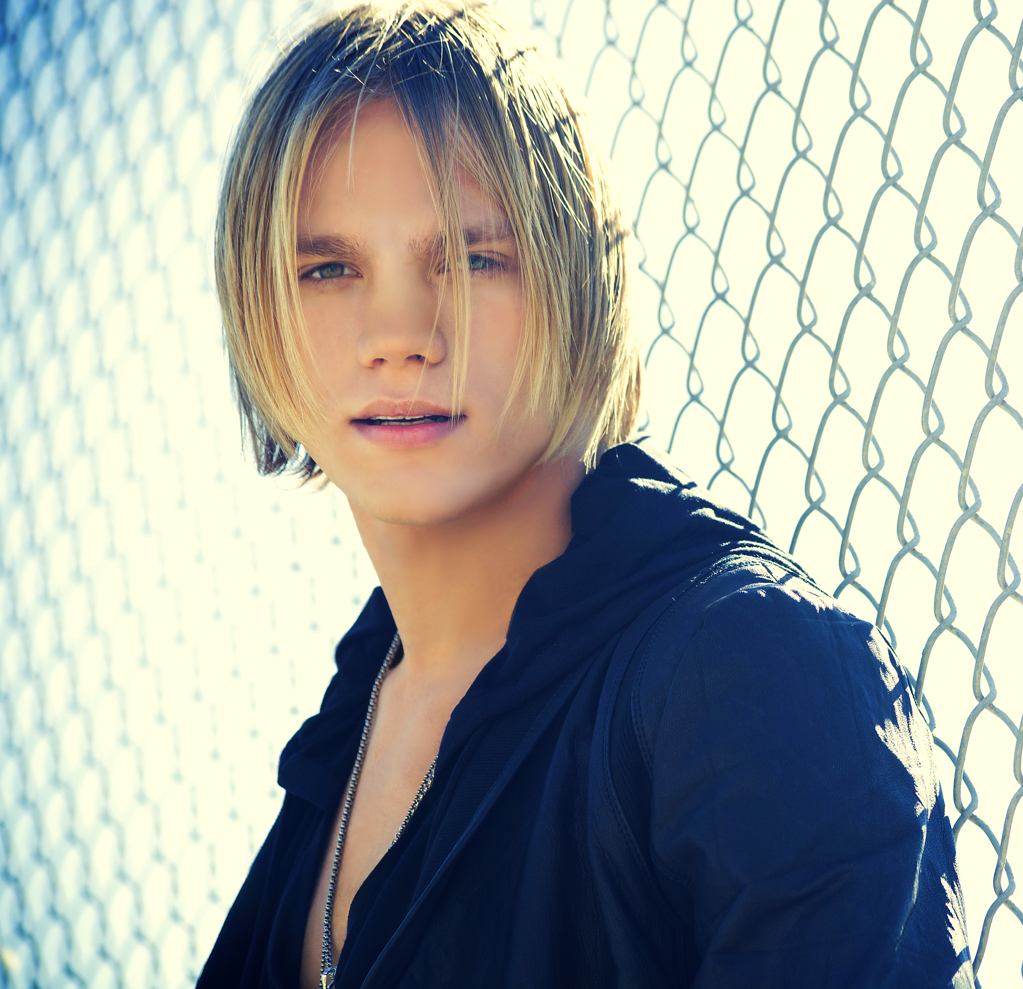 Эдуард Романюта